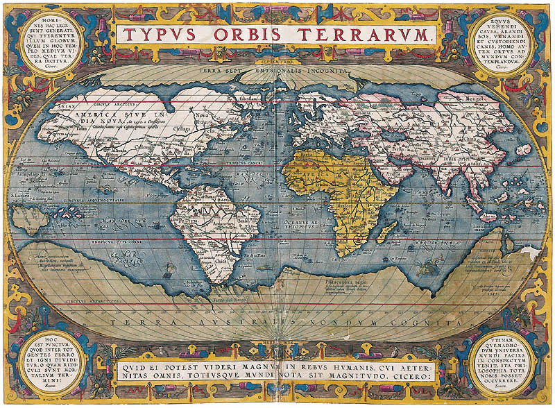 Typus Orbis Terrarum. (Imagem da Terra) ORTELIUS, Abraham 1587 Buril e aquarela sobre papel 10 x 10 cm Acervo Fundação Biblioteca Nacional, Rio de Janeiro